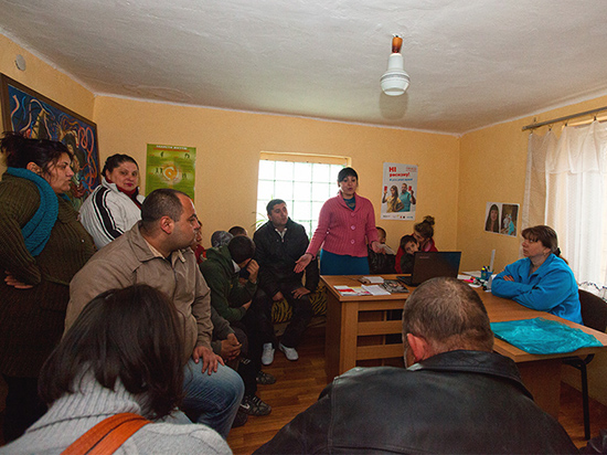 Семінар для ромів, який проводять працівники Благодійного фонду "Розвиток"